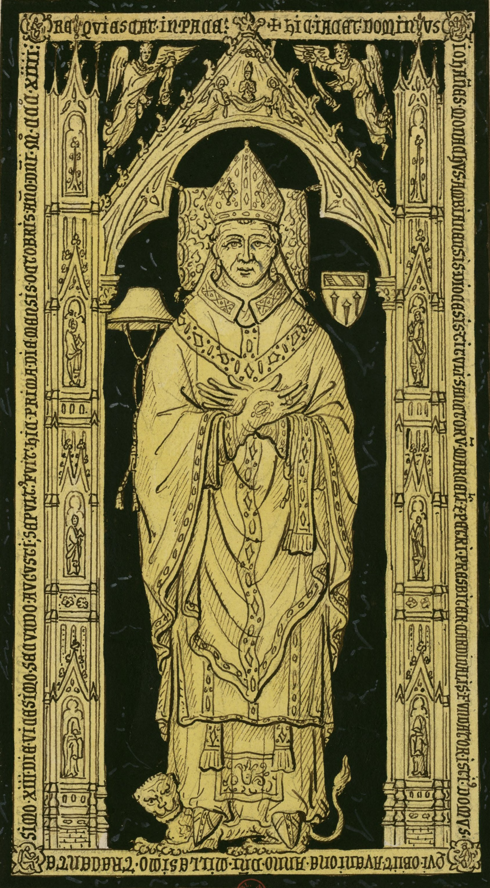 Tombe de cuivre et d'ardoise sur laquelle est gravée l'effigie d'un prélat